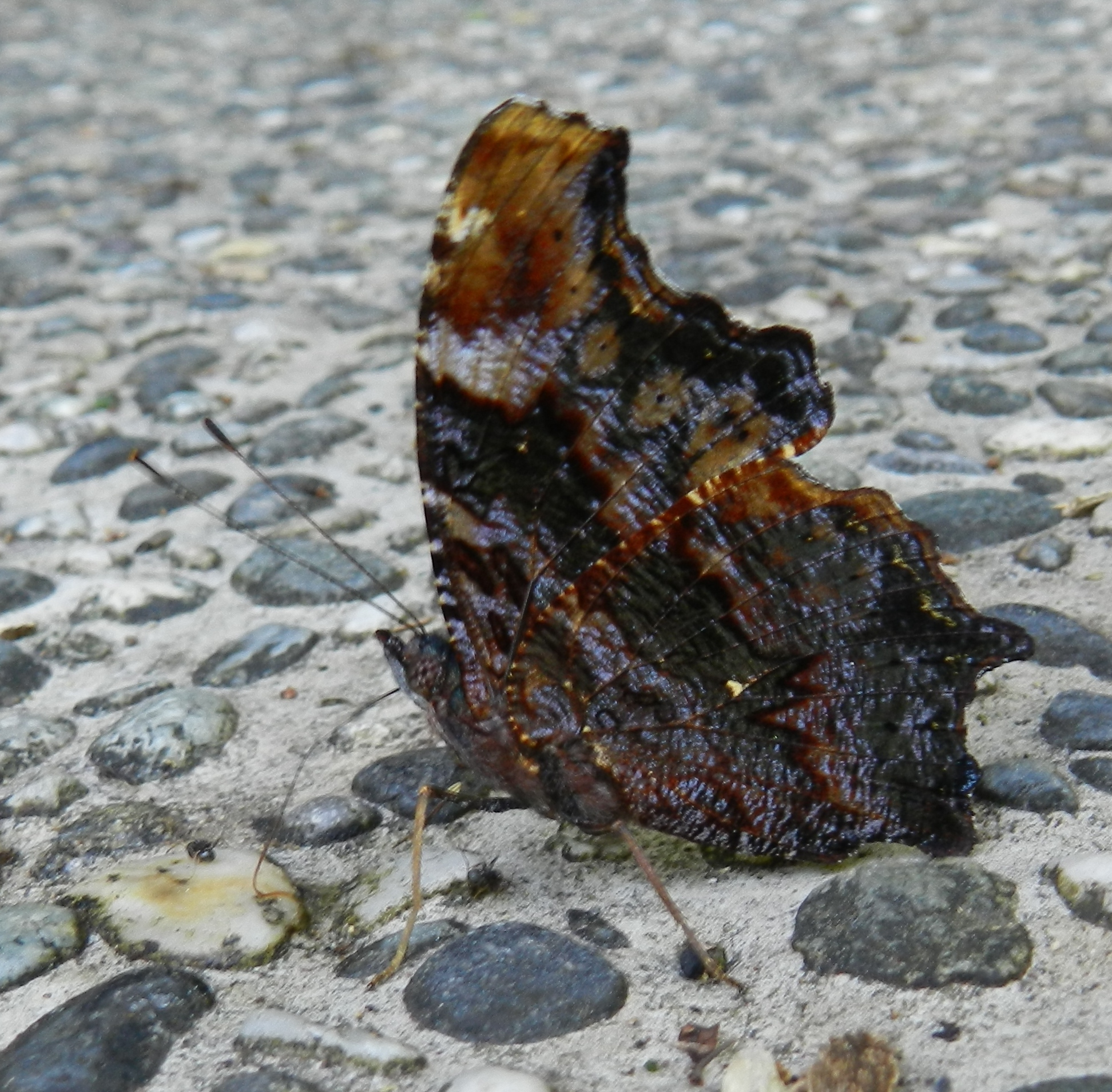 313琉璃蛺蝶11(游釗敏攝)